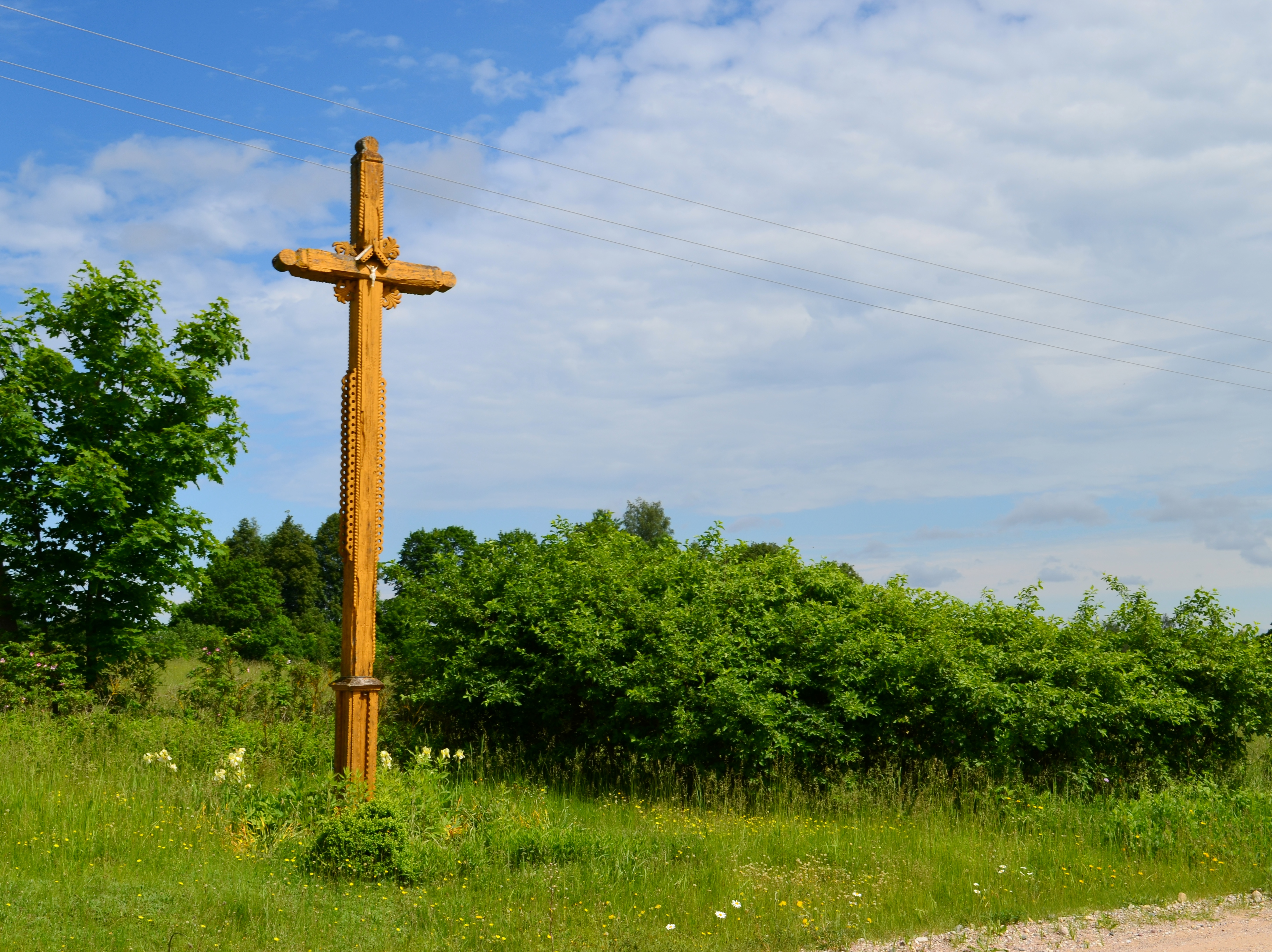 Ūžėniškės, Zarasų r.